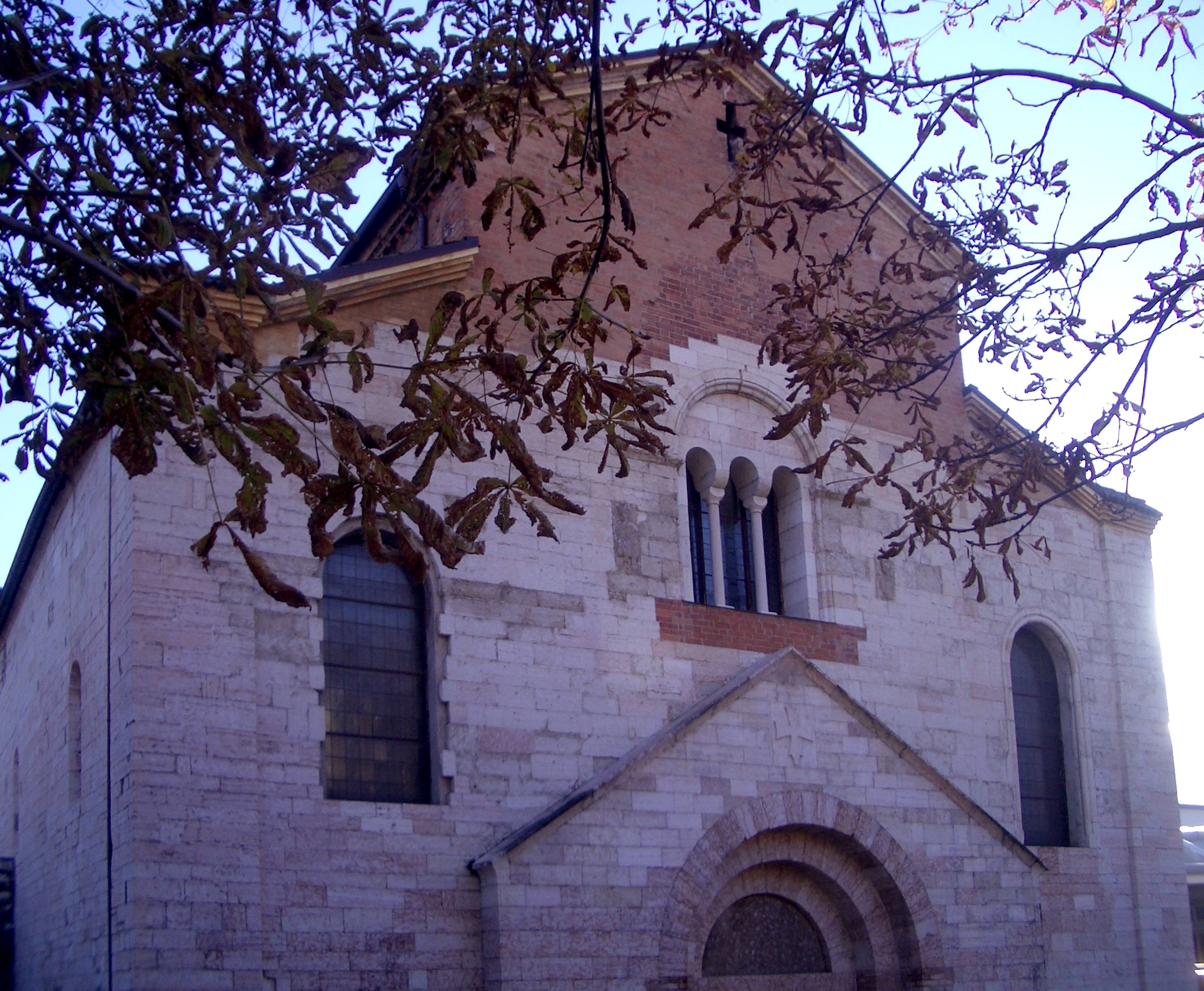 Badia di San Lorenzo , Trento, Italy